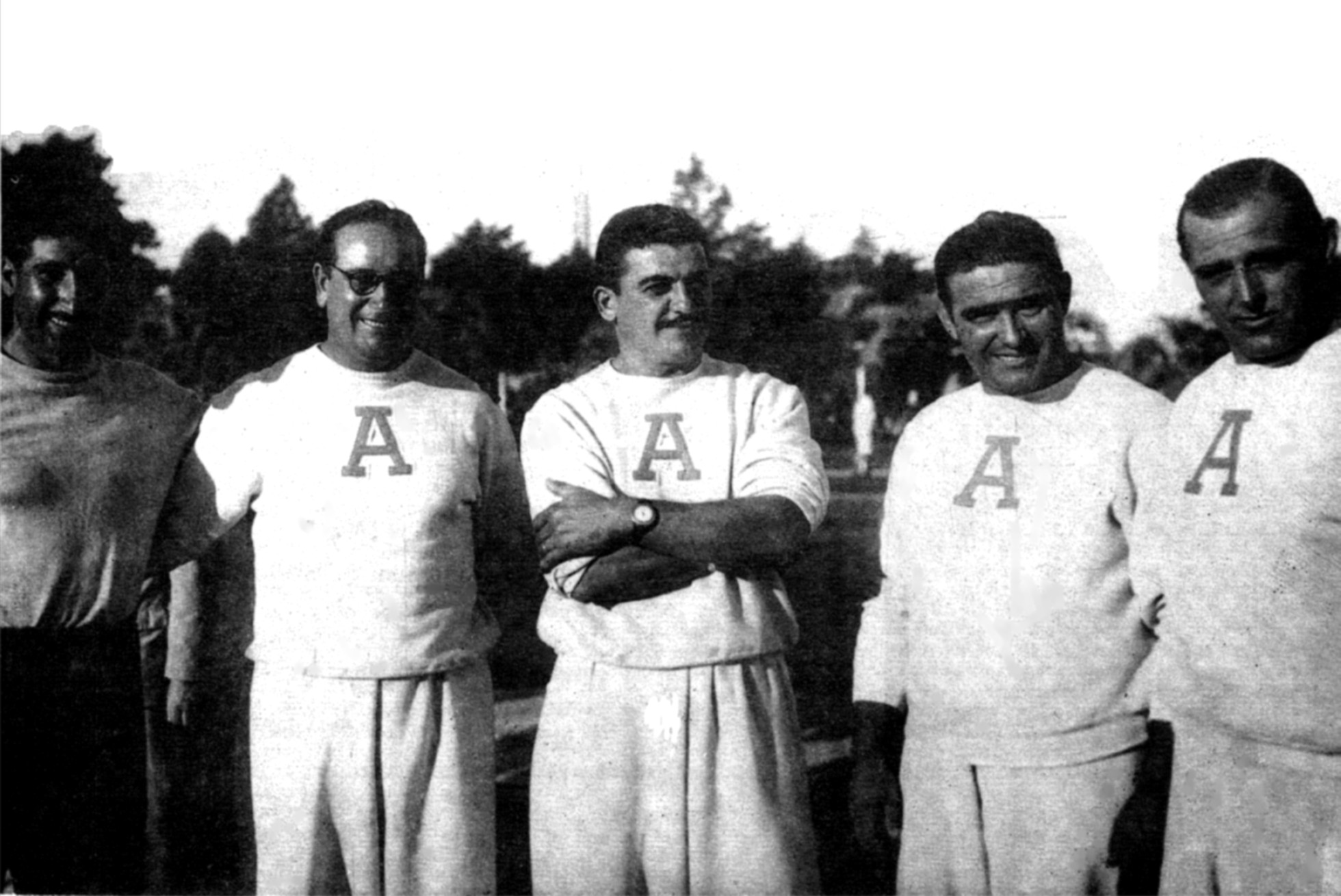 De izquierda a derecha: Vázquez (Uruguay) y los argentinos Manuel Etchepare, Guillermo Brunori, Juan Fusé y F. Kleger. Montevideo, 1945.